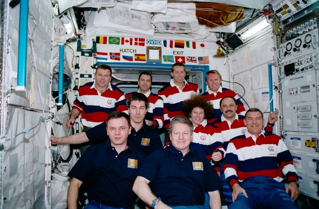 Mannschaft der Space Shuttle Mission STS-102 Details: Aufgenommen am 21. März 2001 im Labor U.S. Destiny. Im vorderen Bereich, von links die Kosmonauten Yuri P. Gidzenko und Sergei Krikalev. Die Astronauten William M. (Bill) Shepherd und Susan J. Helms, Kosmonaut Yury V. Usachev und Astronaut James S. Voss. Im hinteren Bereich, von links die Astronauten James M. Kelly, Paul W. Richards, James D. Wetherbee und Andrew S.W. Thomas.